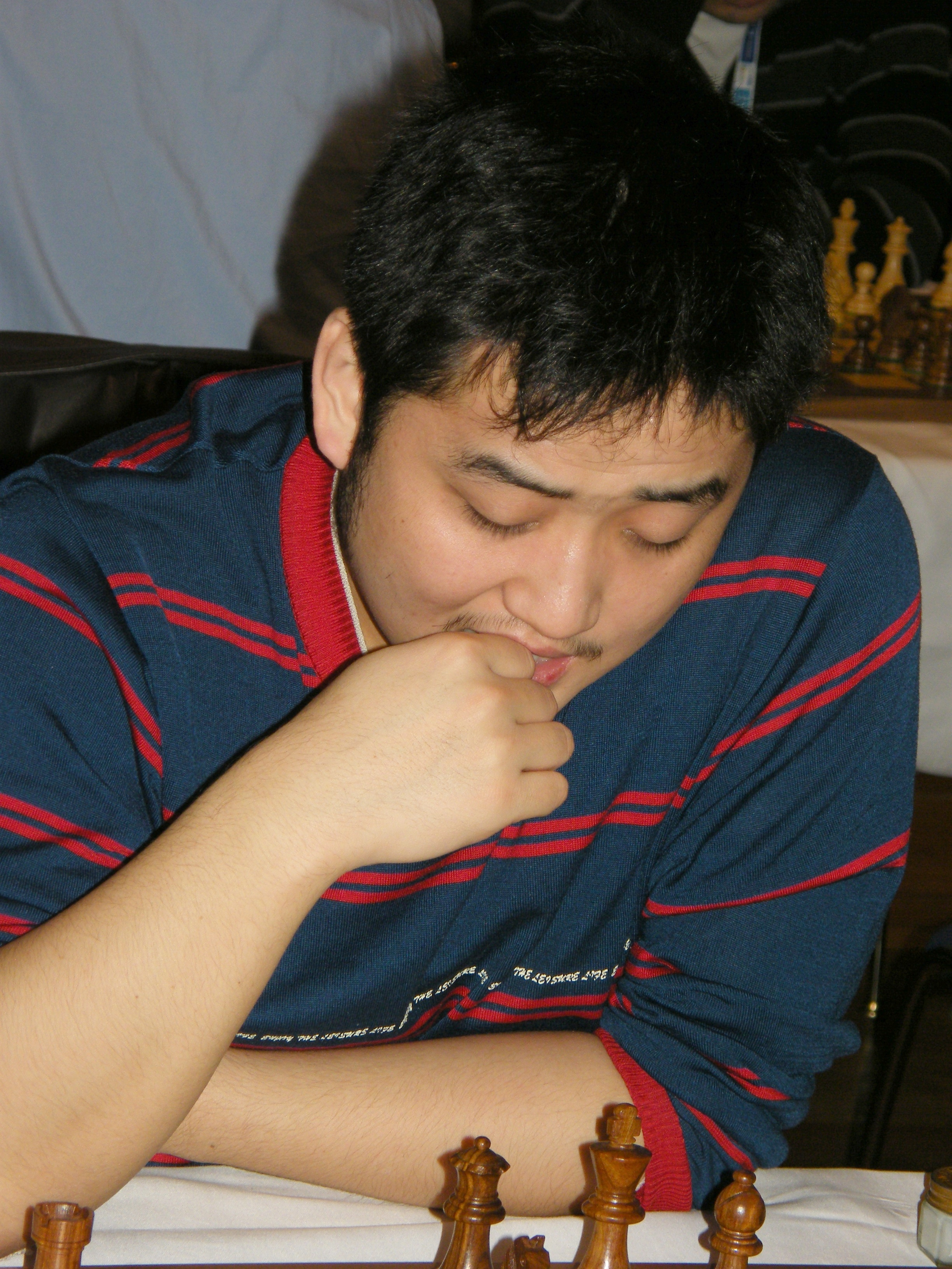 Yue Wang bei der 38. Schacholympiade in Dresden 2008